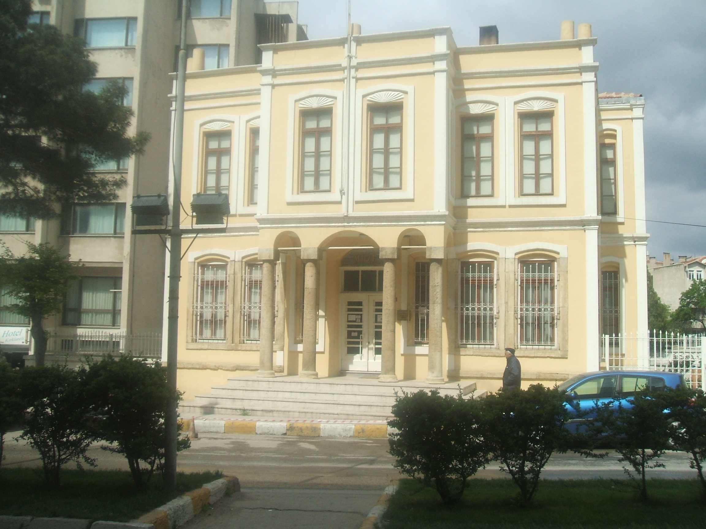 Kırklareli Müzesi